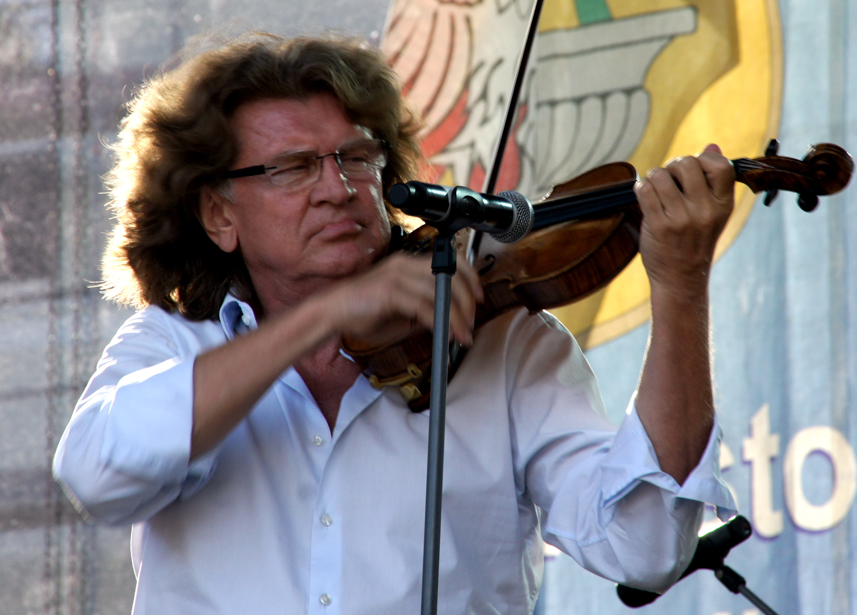 Zbigniew Wodecki w czasie występu w Otwockim parku